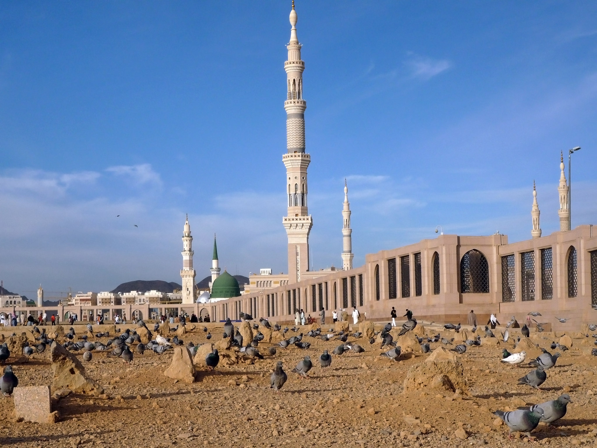 طيري طيري يا حمامة للبقيع و ارض رامة